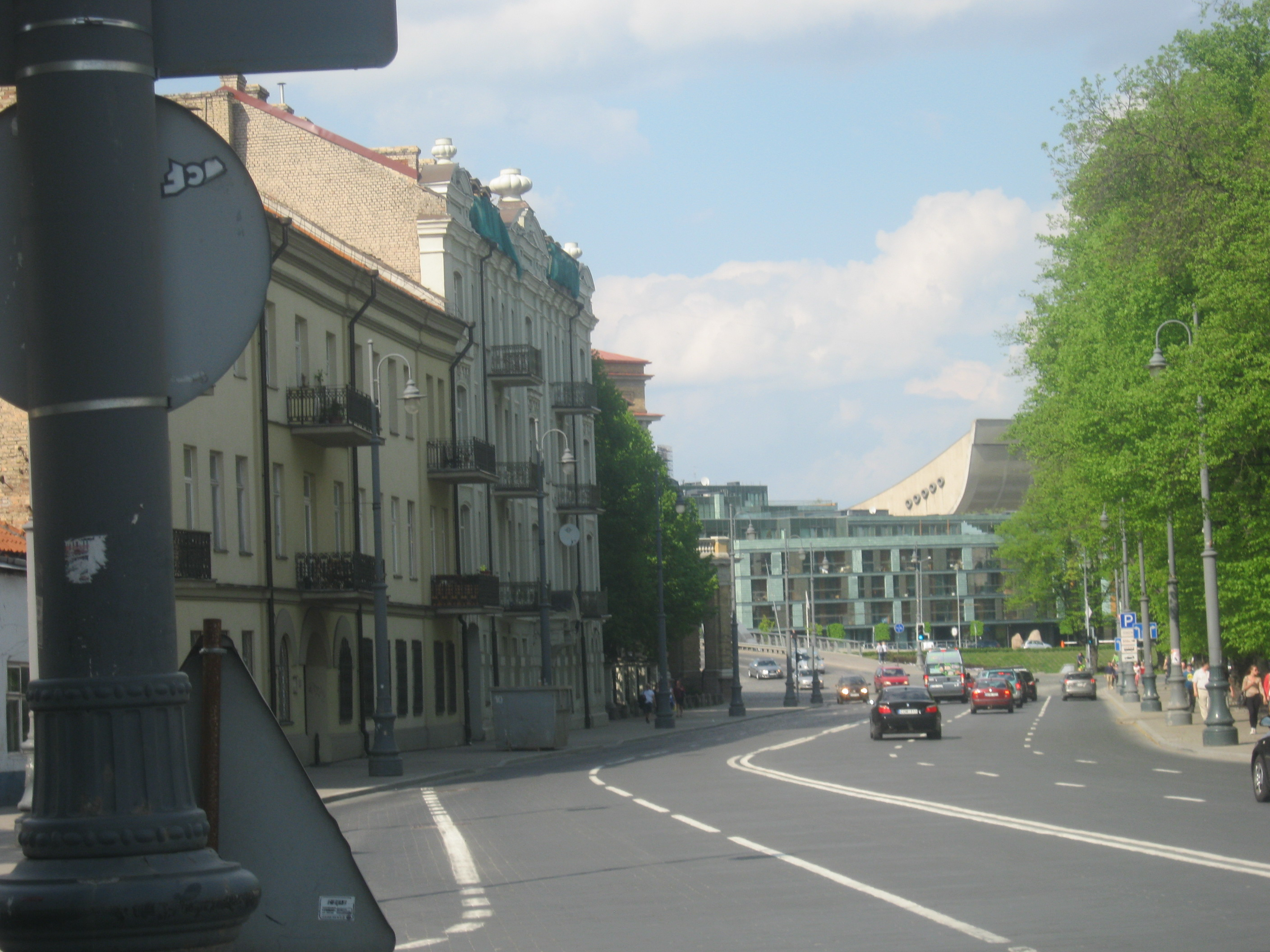 T. Vrublevskio pradžia